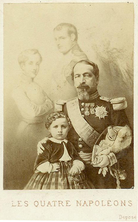 Les Quatre Napoléon, imagerie de propagande exaltant la dynastie napoléonienne sous le Second Empire.